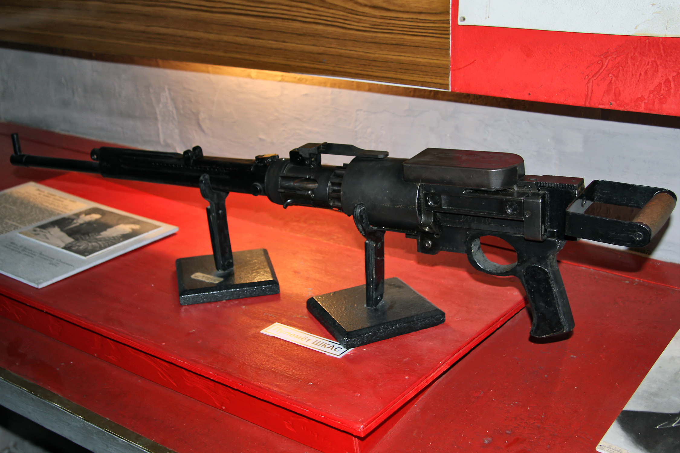 Первый советский скорострельный авиационный пулемёт 7,62 мм ШКАС (7,62 mm machine gun ShKAS)